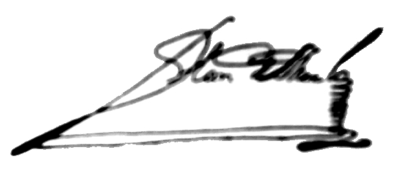 Firma quirografaria del escribano del Cabildo de Buenos Aires, don Francisco de Merlo, fundador del pueblo de Merlo, Provincia de Buenos Aires.